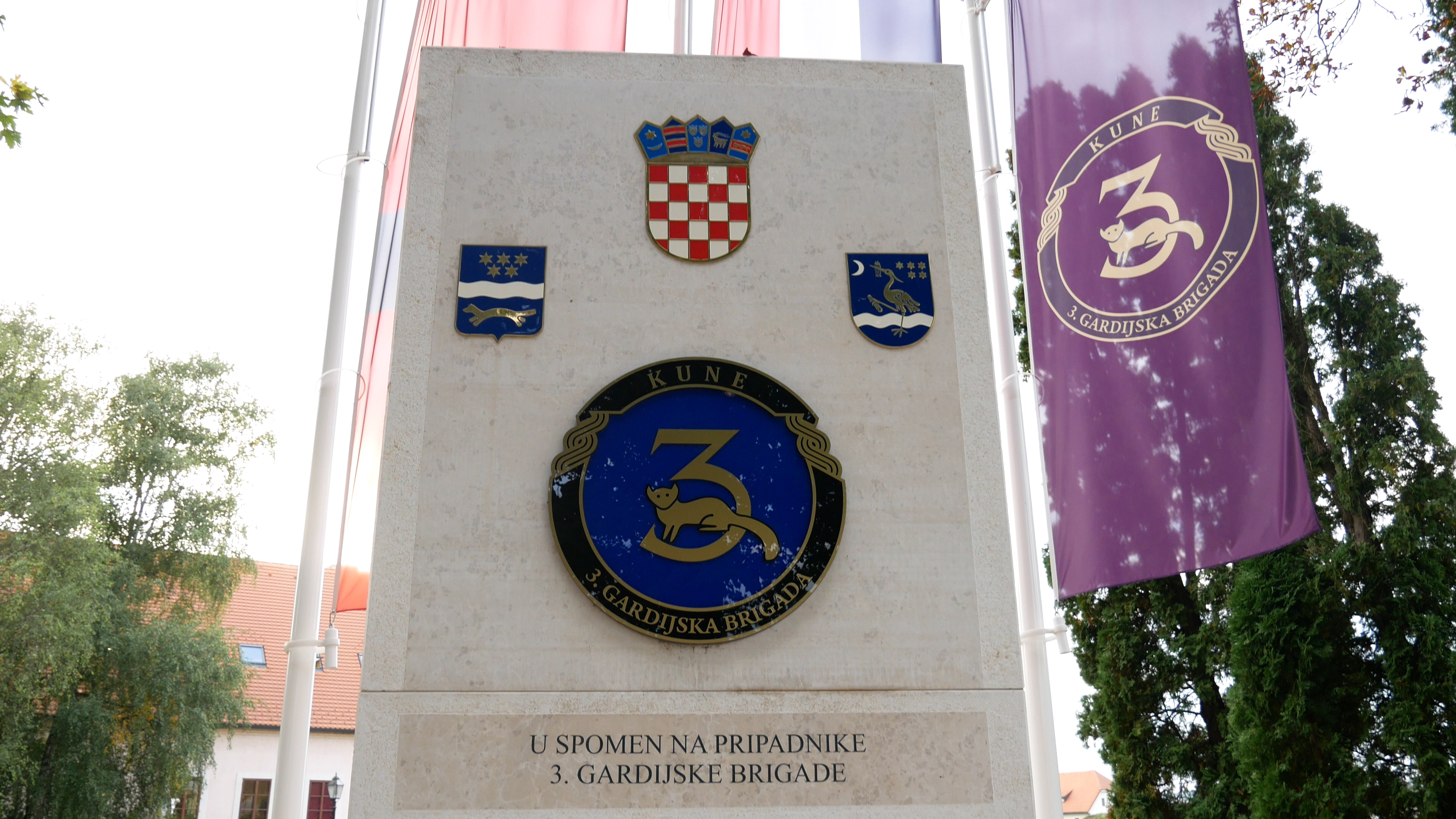 Spomenik pripadnicima 3. gardijske brigade "Kune"